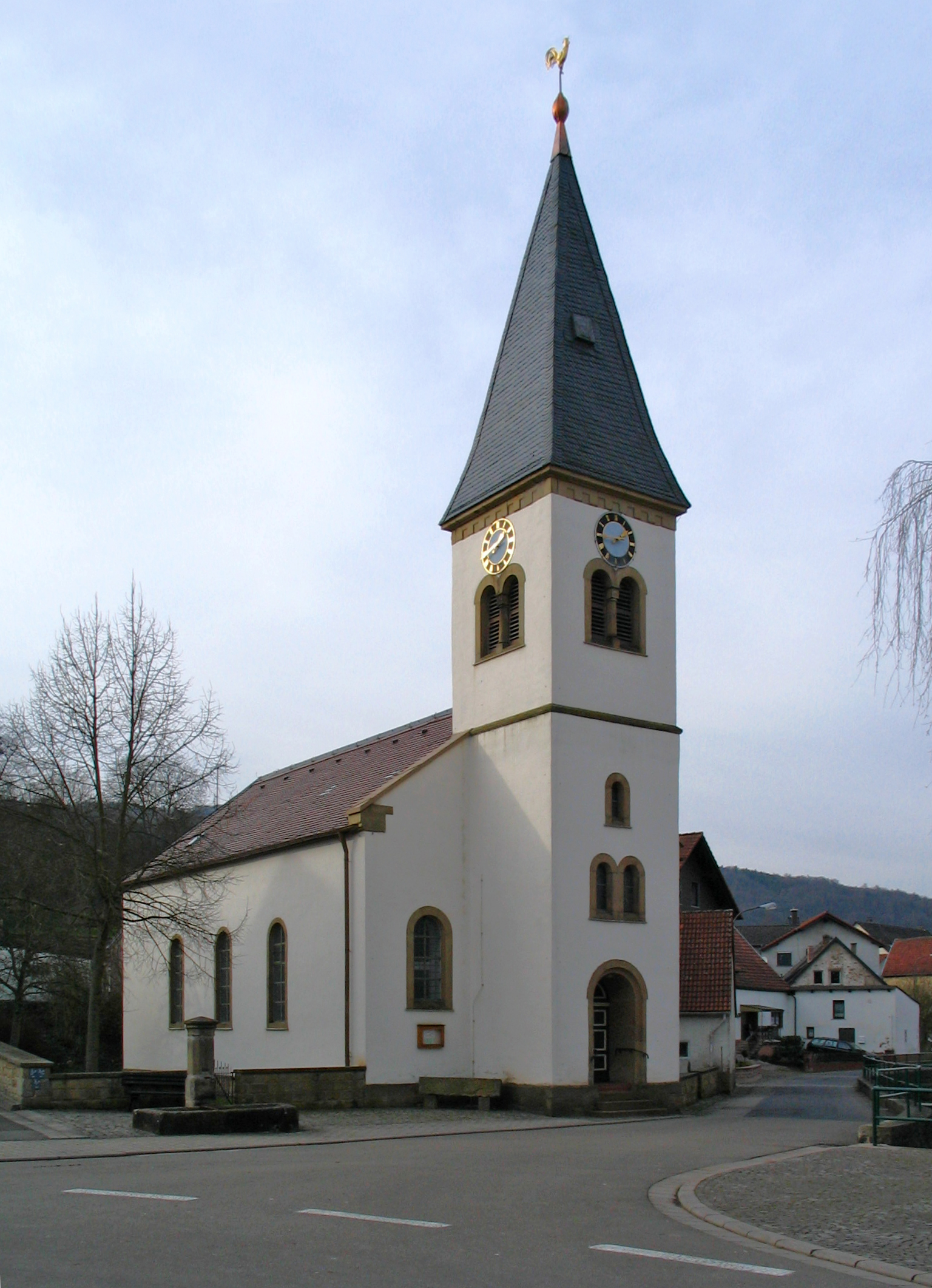 Die evangelische Kirche in Essweiler